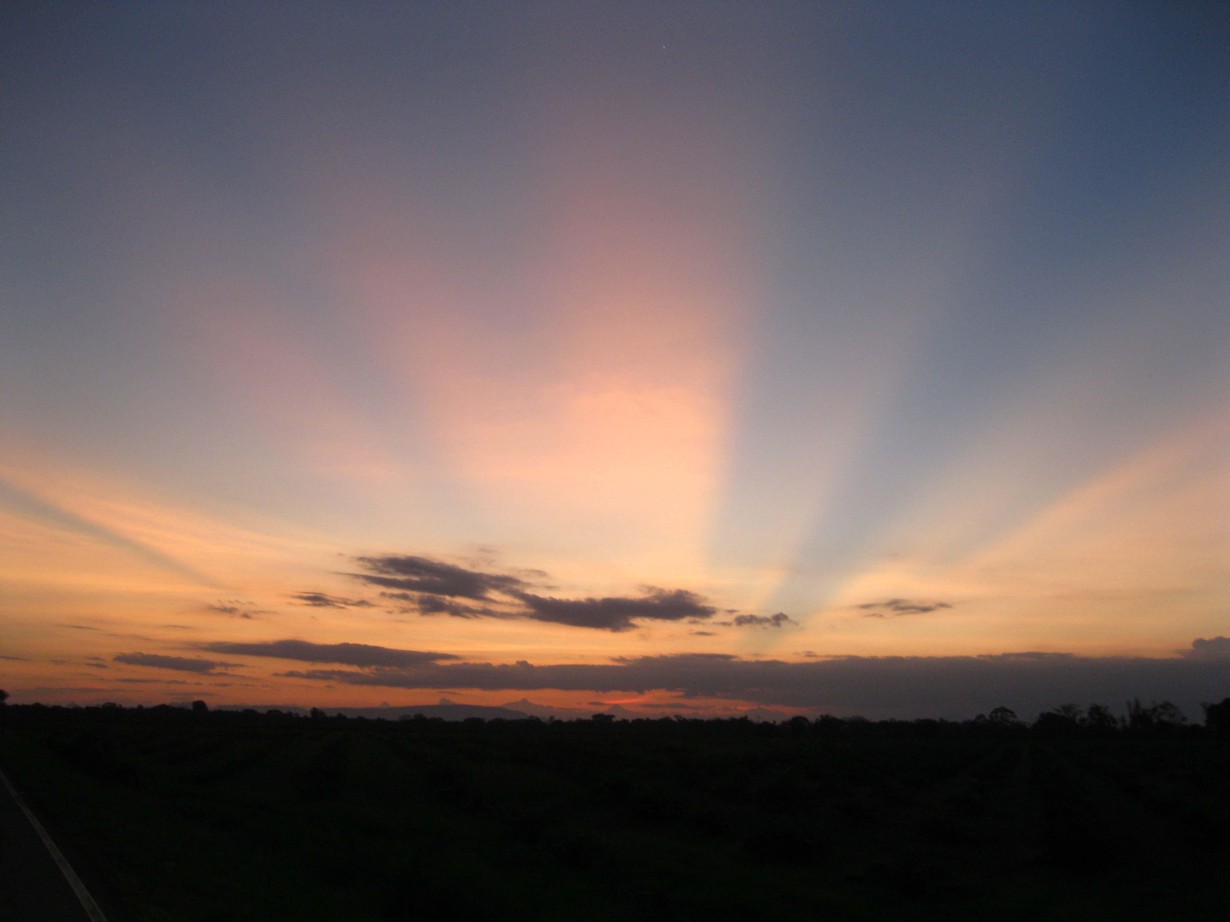 Atardecer cerca a Vista Hermosa (Meta-Colombia)